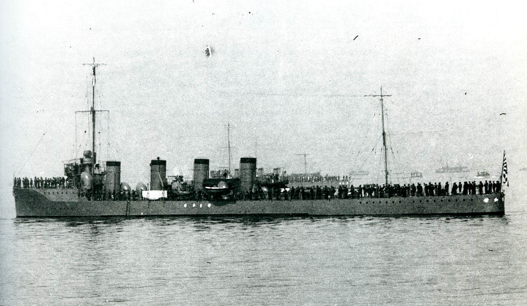 Japanese destroyer Yamakaze at Ominato, Japan in 1926